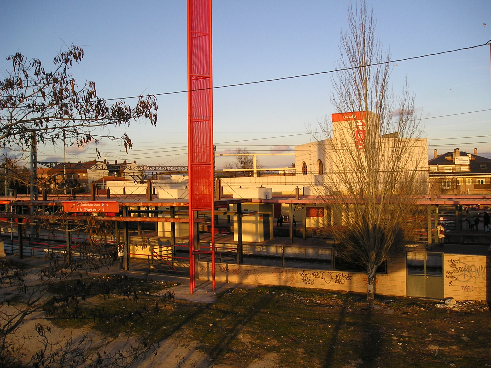 Estación de ferrocarril de Las Matas Foto realizada el 6-1-2006 por Santiago Agueda Alonso